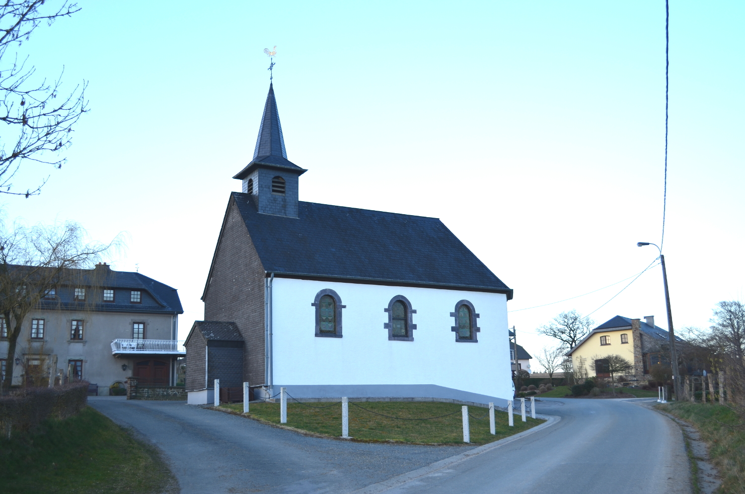 Zentrum von Malscheid, Burg-Reuland, mit Kapelle